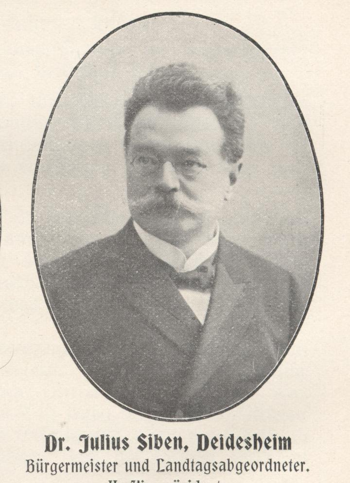 Dr. Julius Siben, Deidesheim, Bayerischer Landtagsabgeordneter